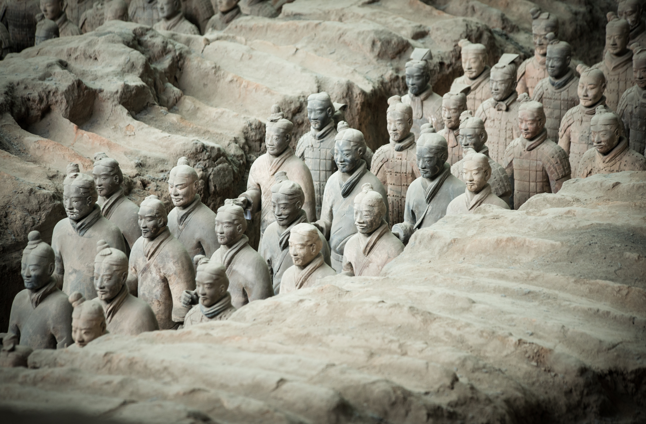 Guerreros de Terracota, Xi'an